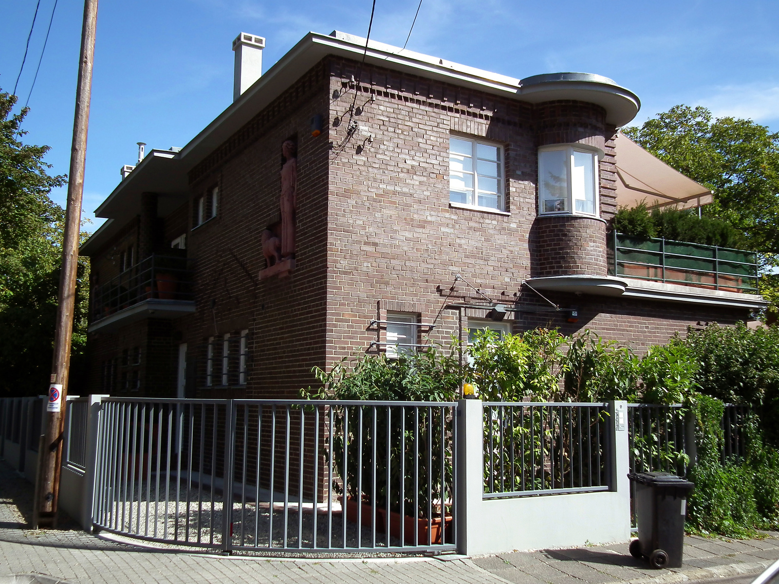 kislakás (Napraforgó u. 9.) (Budapest 2, Napraforgó utca 9.) This is a photo of a monument in Hungary, Identifier: 300